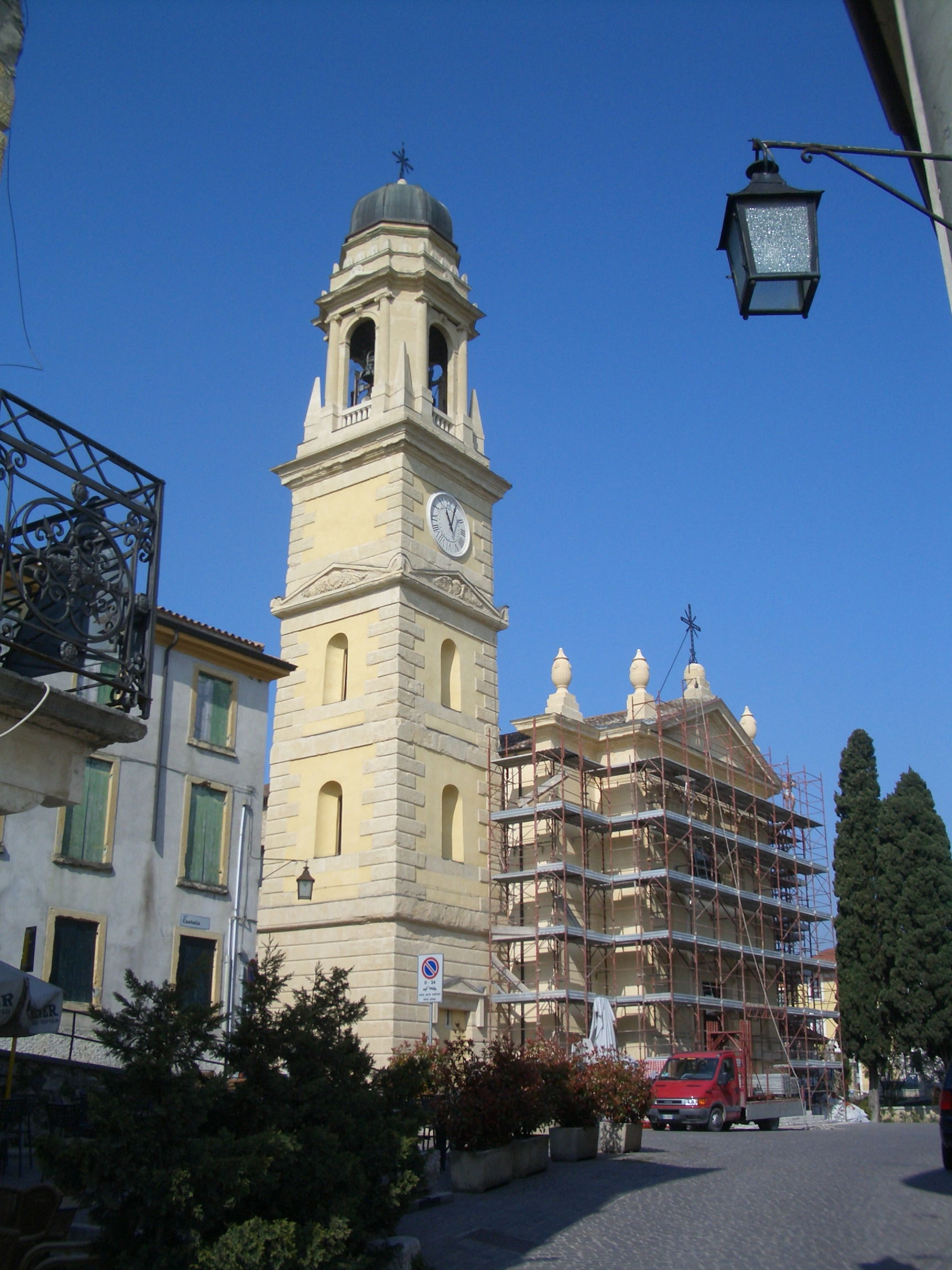 Chiesa Parrocchiale di Castelrotto - San Pietro in Cariano - Verona, in restauro